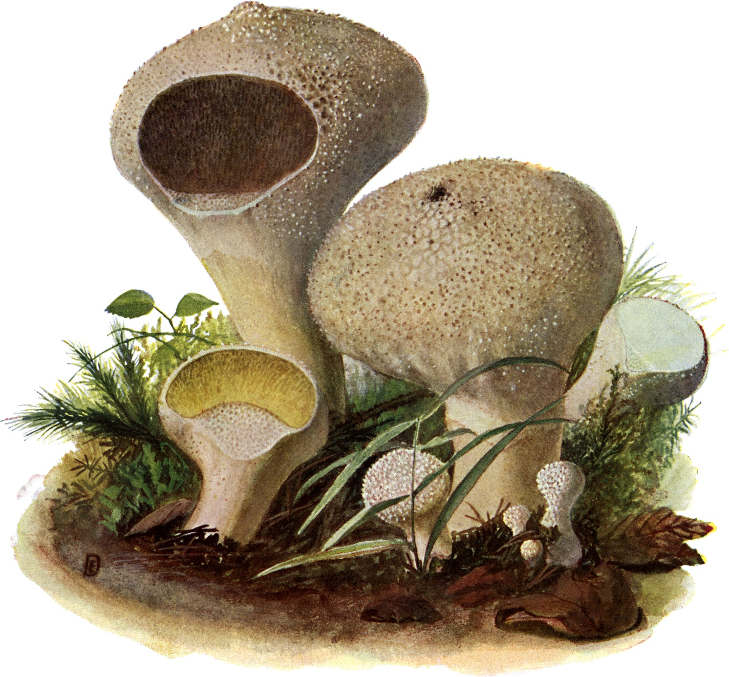 Flaschen-Bovist, Lycoperdon gemmatum. Eßbar (jung).